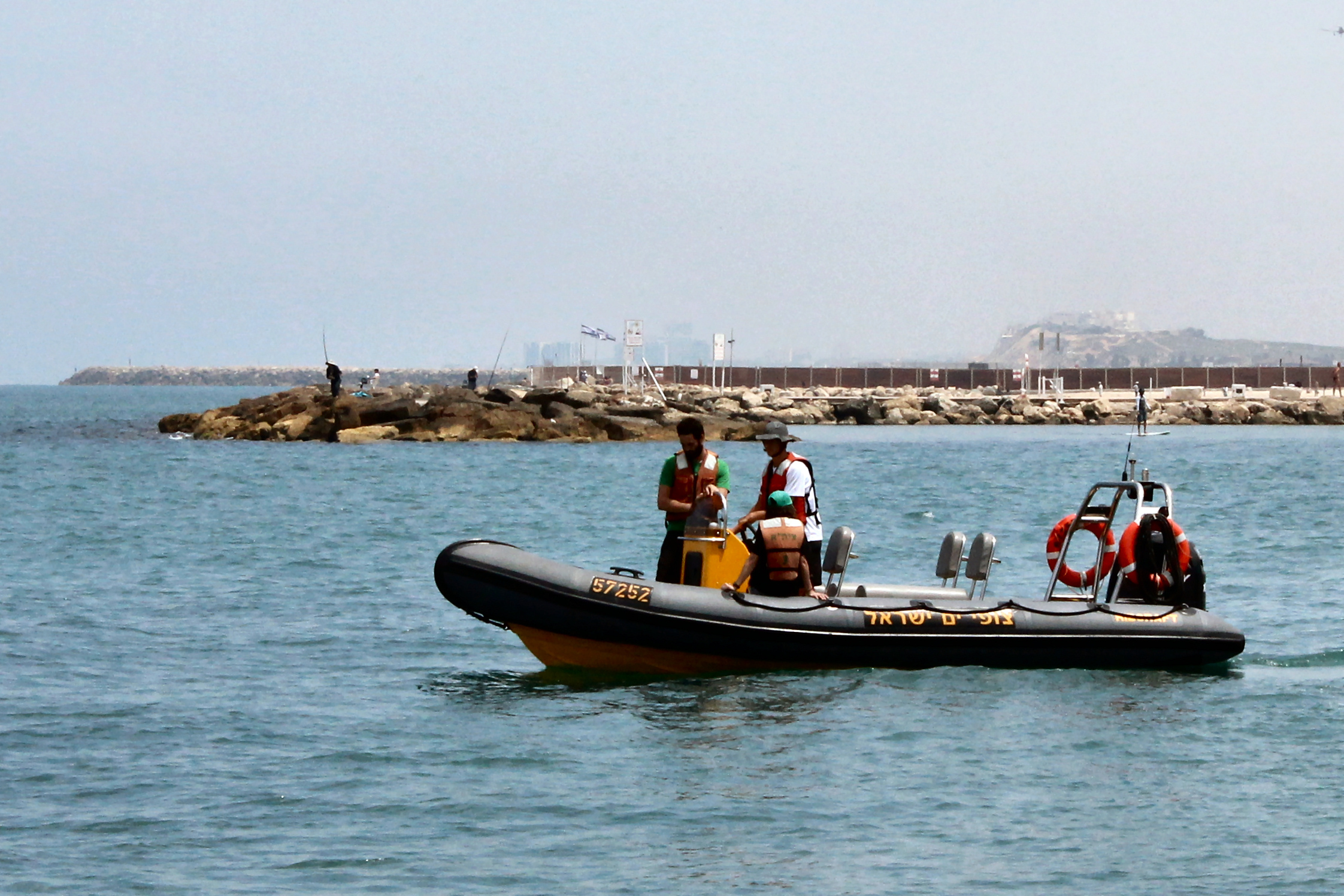 סירה של צופי ים ת"א ליד מרינה תל-אביב, מאי 2014.